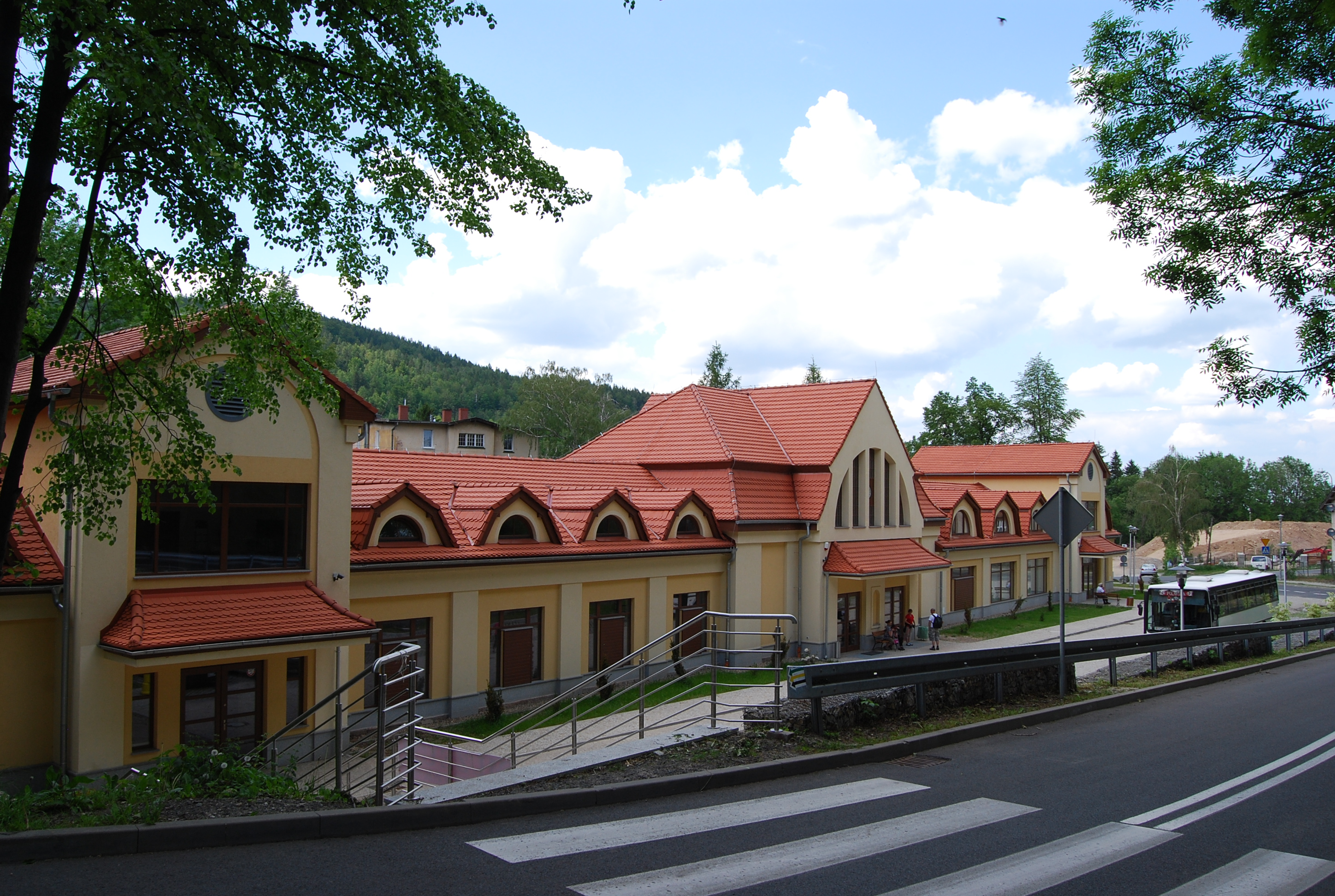 Były dworzec kolejowy w Karpaczu, obecnie mieści się tu Karpaczańskie Centrum Kultury i Turystyki, Miejskie Muzeum Zabawek ze zbiorów Henryka Tomaszewskiego i informacja turystyczna